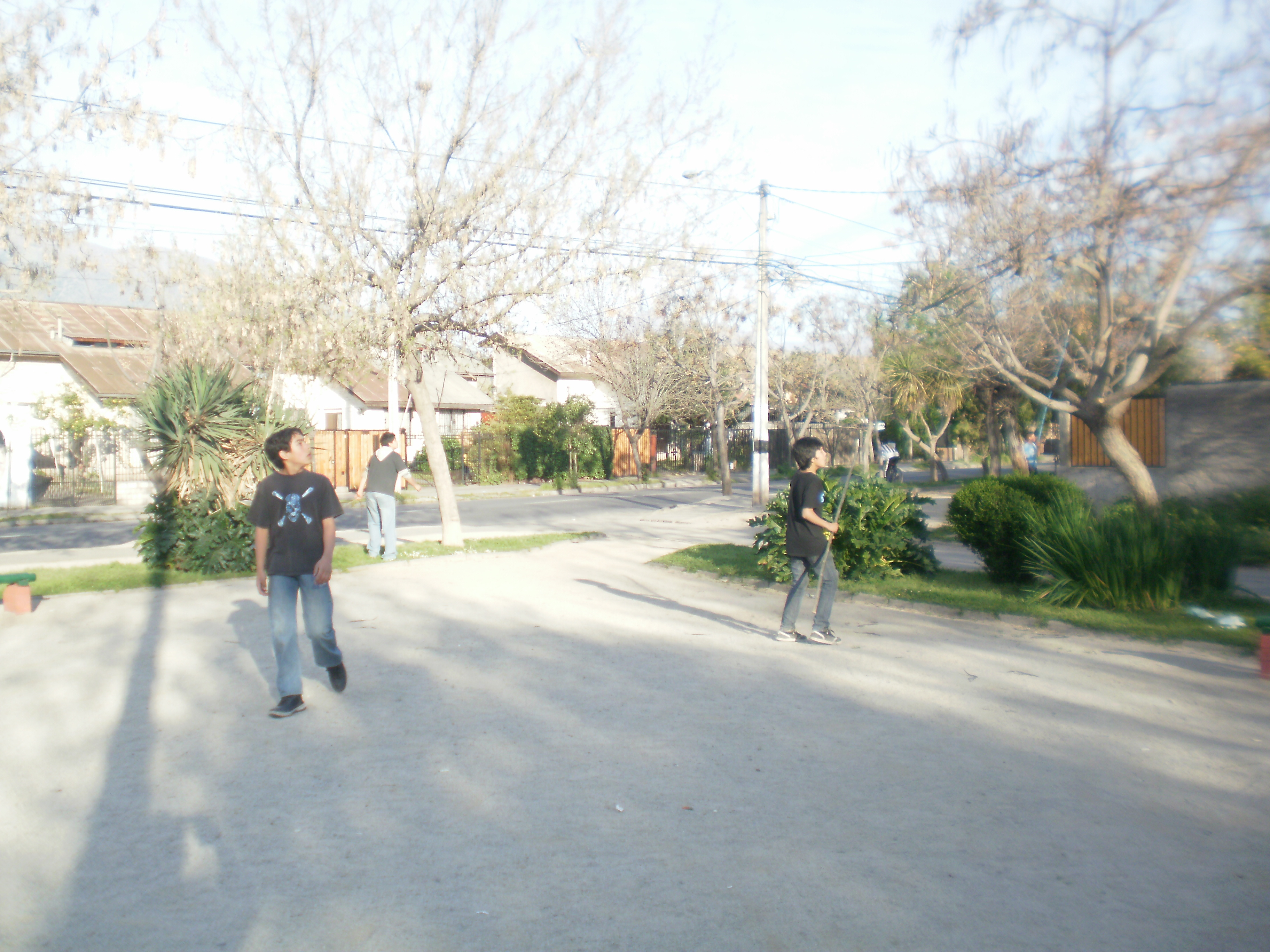 Grupo de niños premunidos con palos especiales miran el cielo esperando el desenlace de un duelo entre dos volantines con hilo curado. Uno sera cortado y pertenecerá quien lo atrape